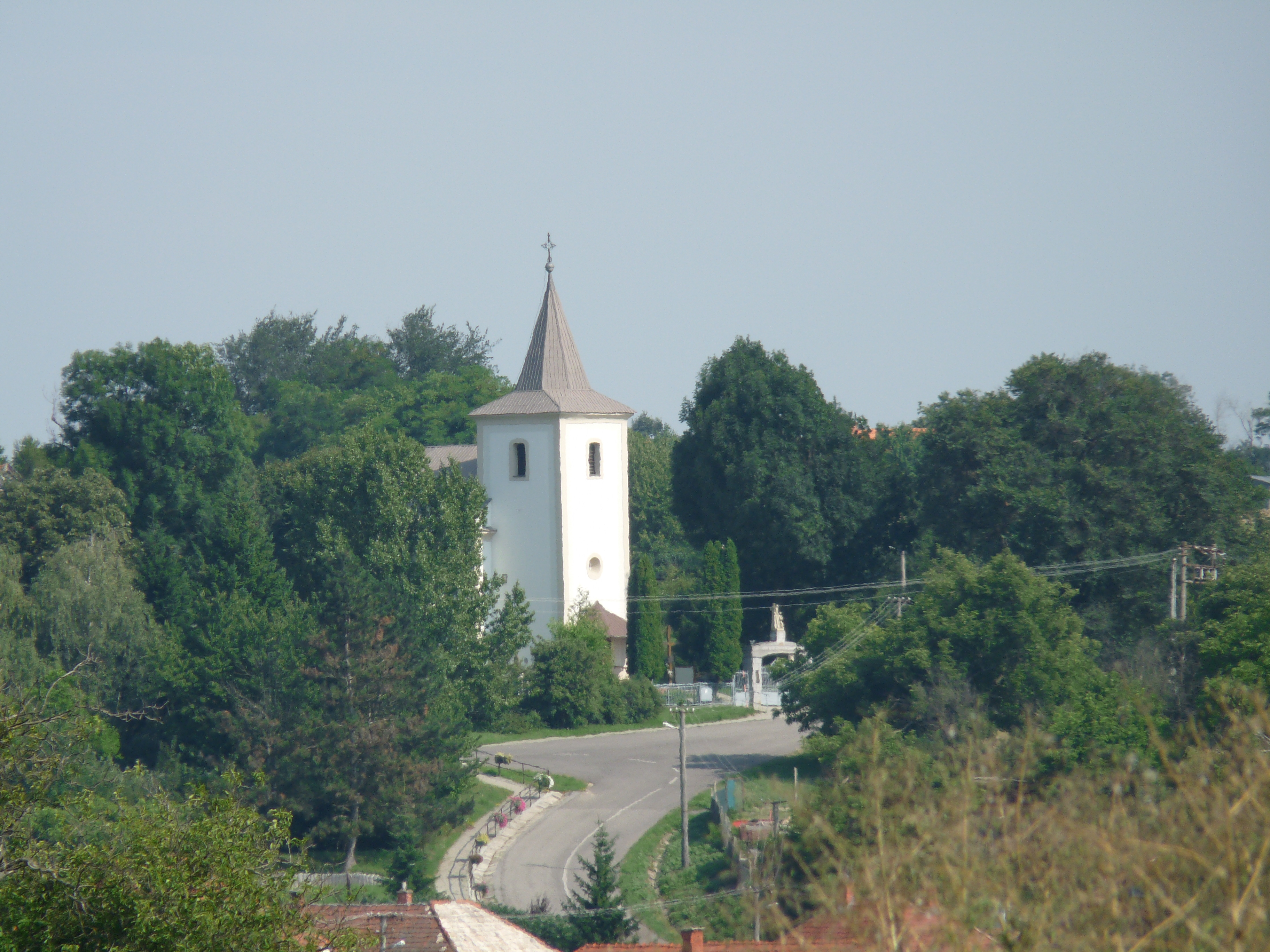 Kostol vo Veľkých Vozokanoch